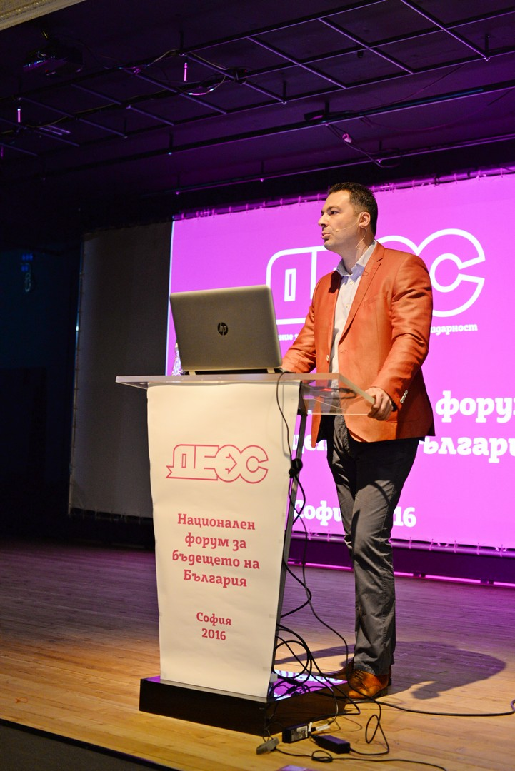 ДЕОС